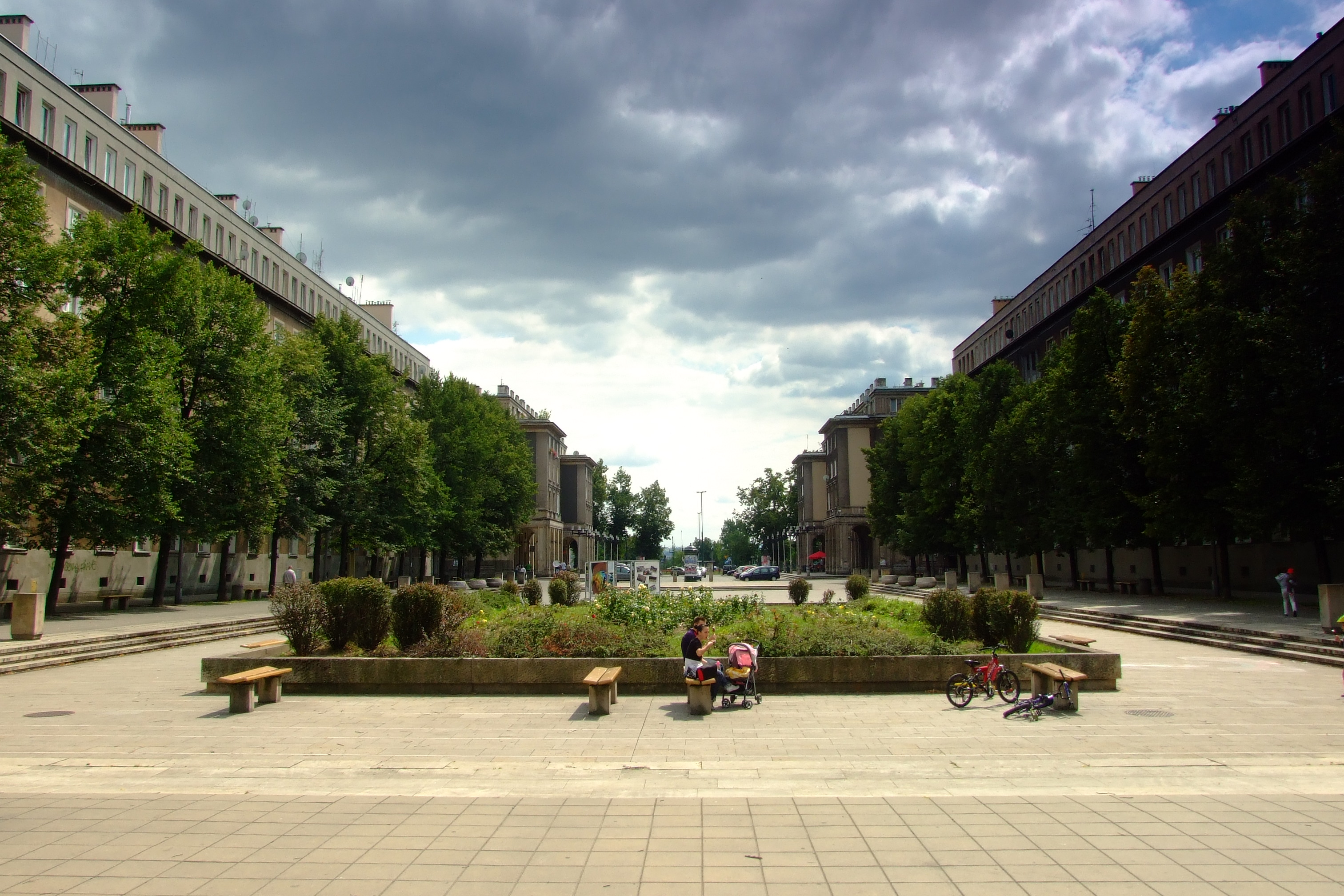 układ urbanistyczny Nowej Huty Kraków, Kraków